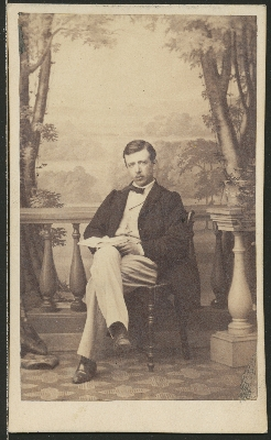 Georg Semper 1863, (rückwärtig datiert), CdV